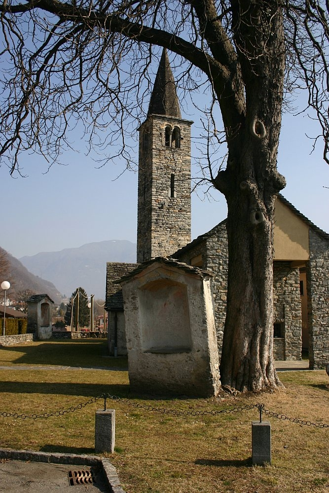 Die Kirche Santa Maria in Progero, ein Orststeil von Gudo